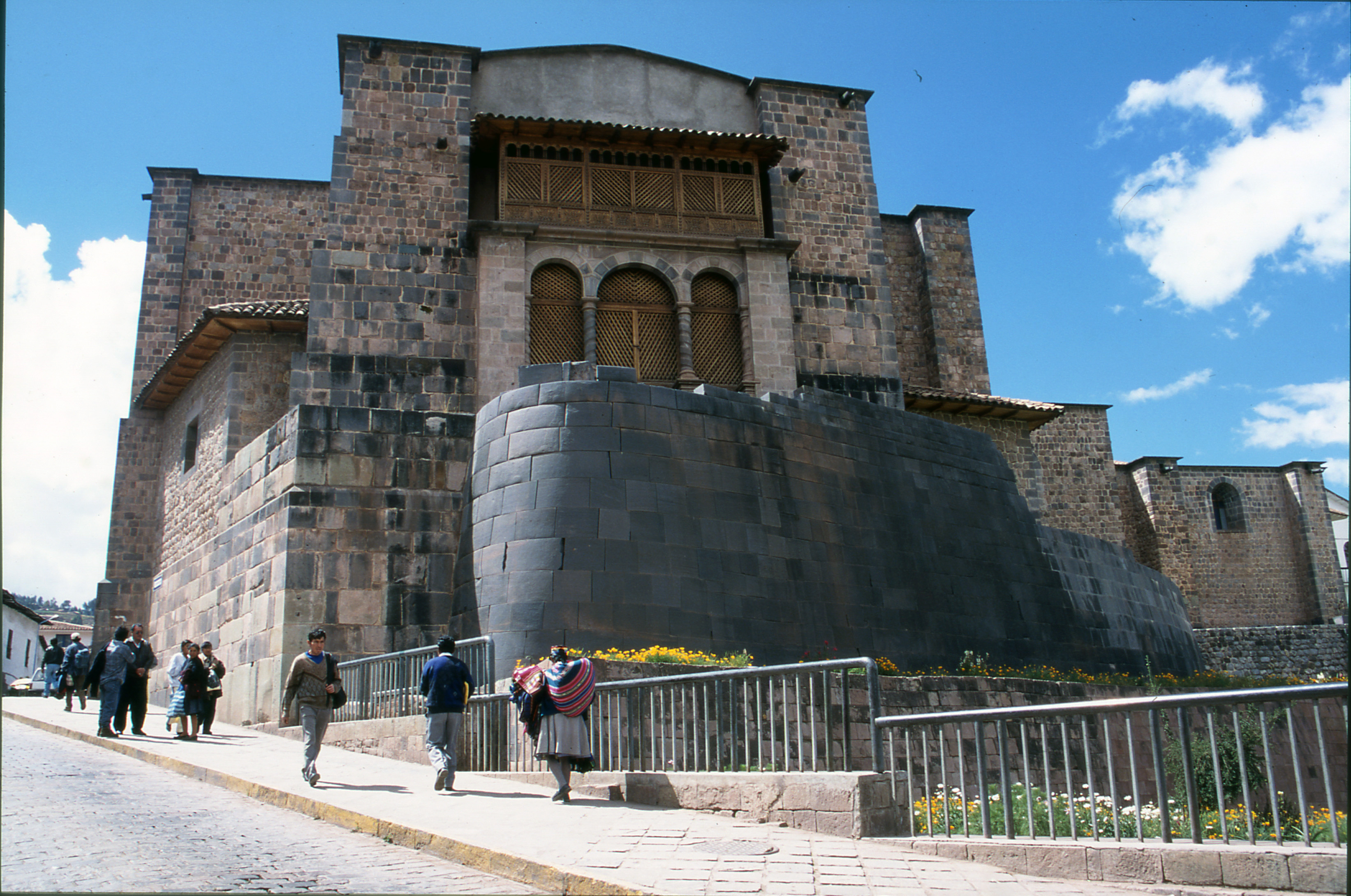 Pérou cusco, temple du soleil